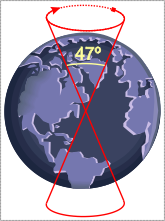 Ángulo de la precesión de los Equinoccios